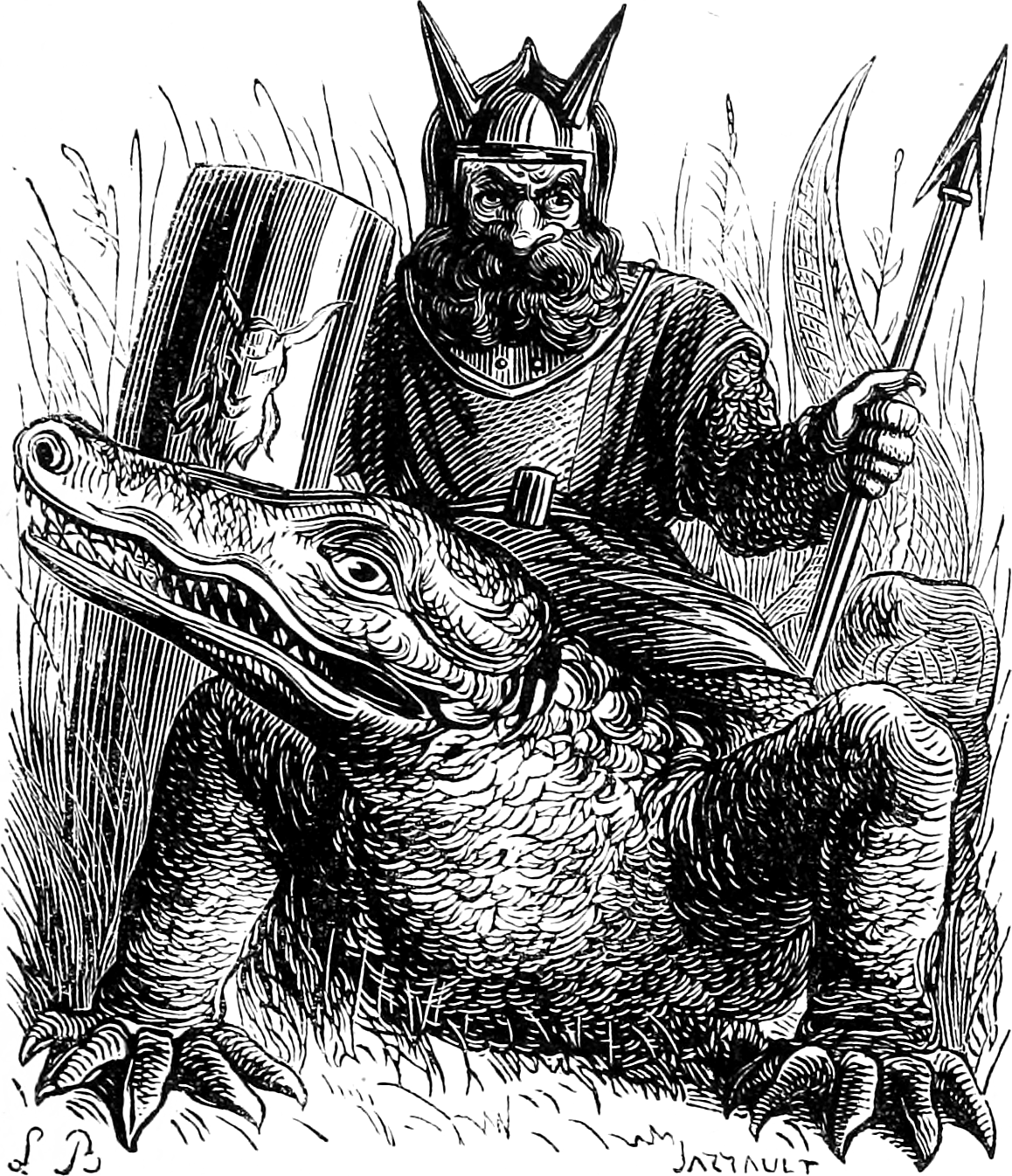 Une illustration pour l’article Zaebos dans le Dictionnaire infernal par Collin de Plancy.